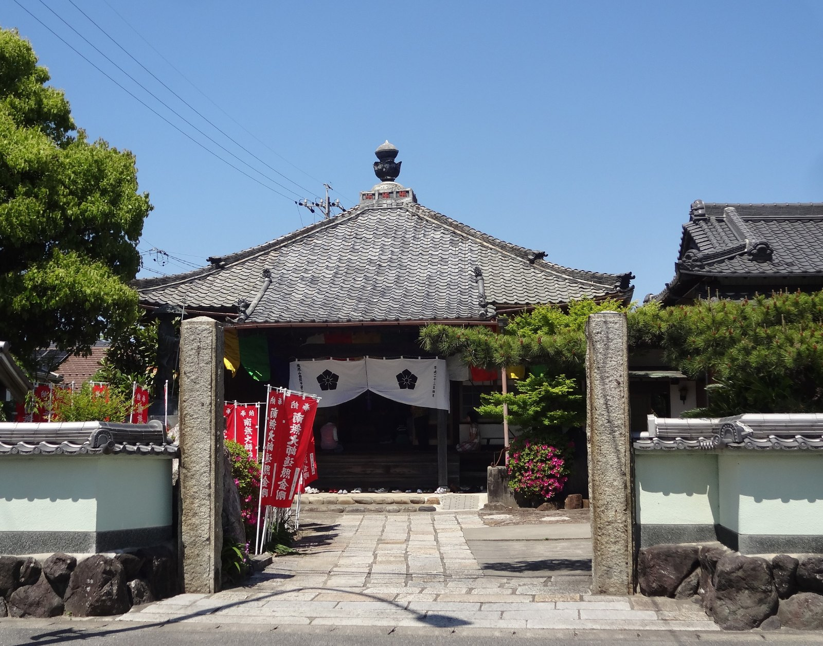 西照寺 本堂